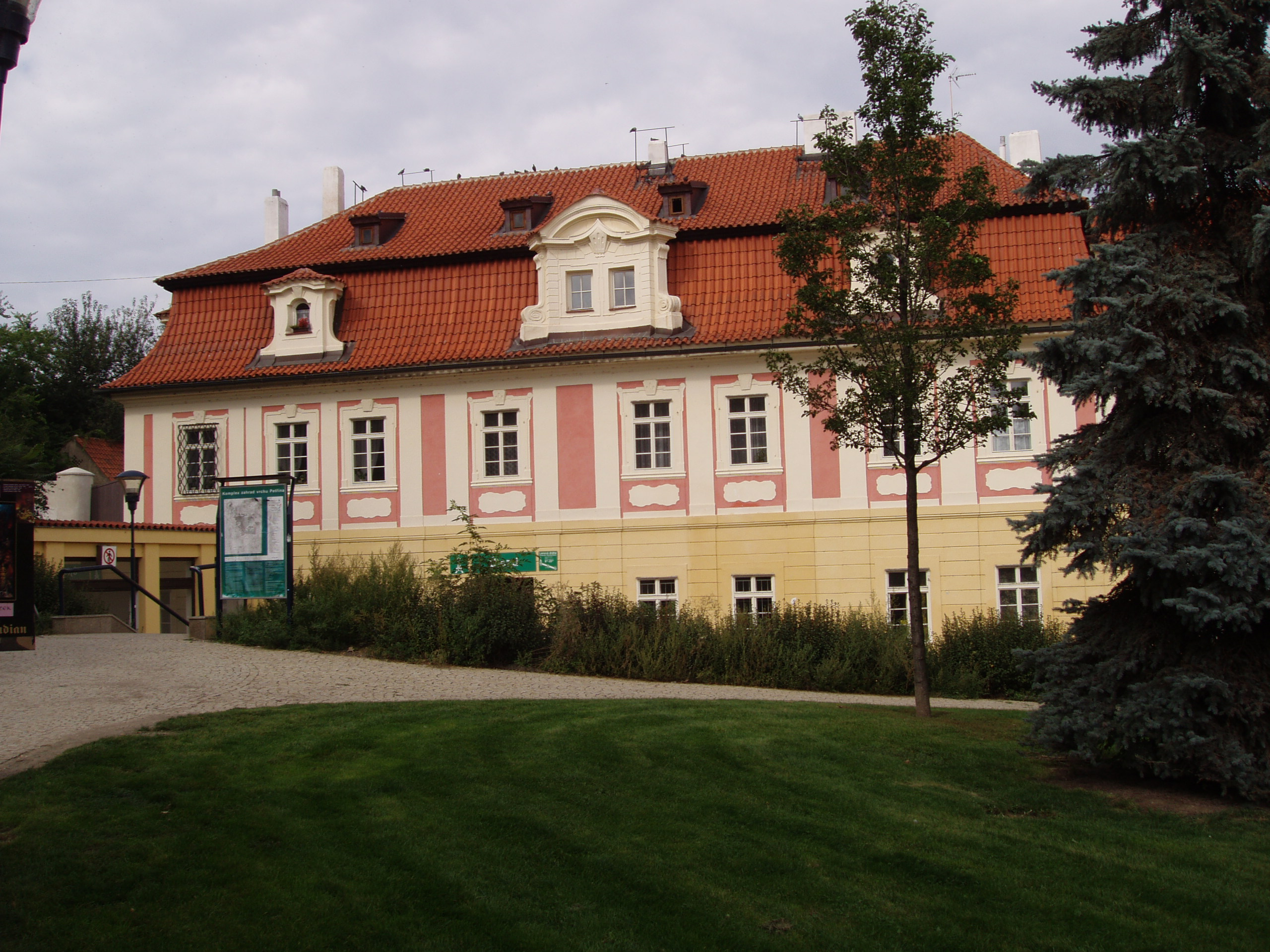 lanová dráha Ujezd